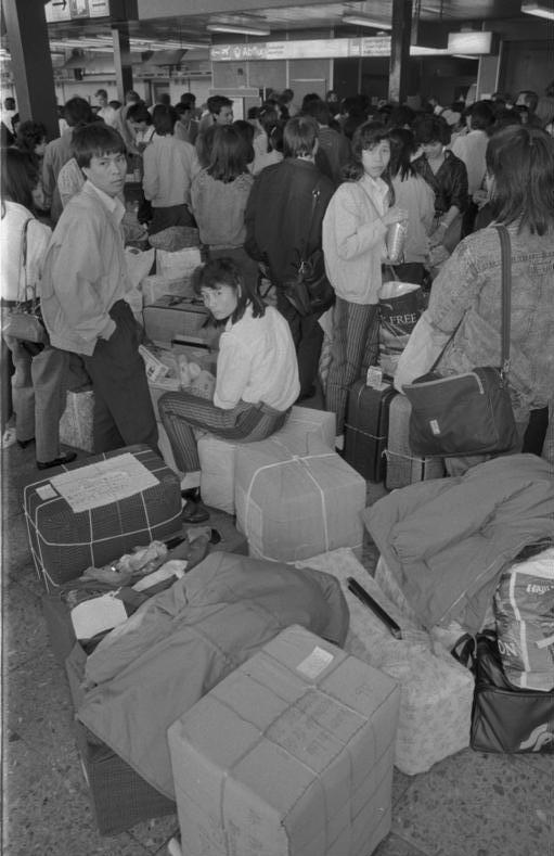 Berlin, vietnamesische Gastarbeiter BER-22/31.5.1990/Berlin: Vietnamesische Gastarbeiter aus Cottbus haben ihre Pakete geschnürt. Mit Chartermaschinen verlassen sie vom Flugplatz Schönefeld aus die DDR. ADN/Hirschberger